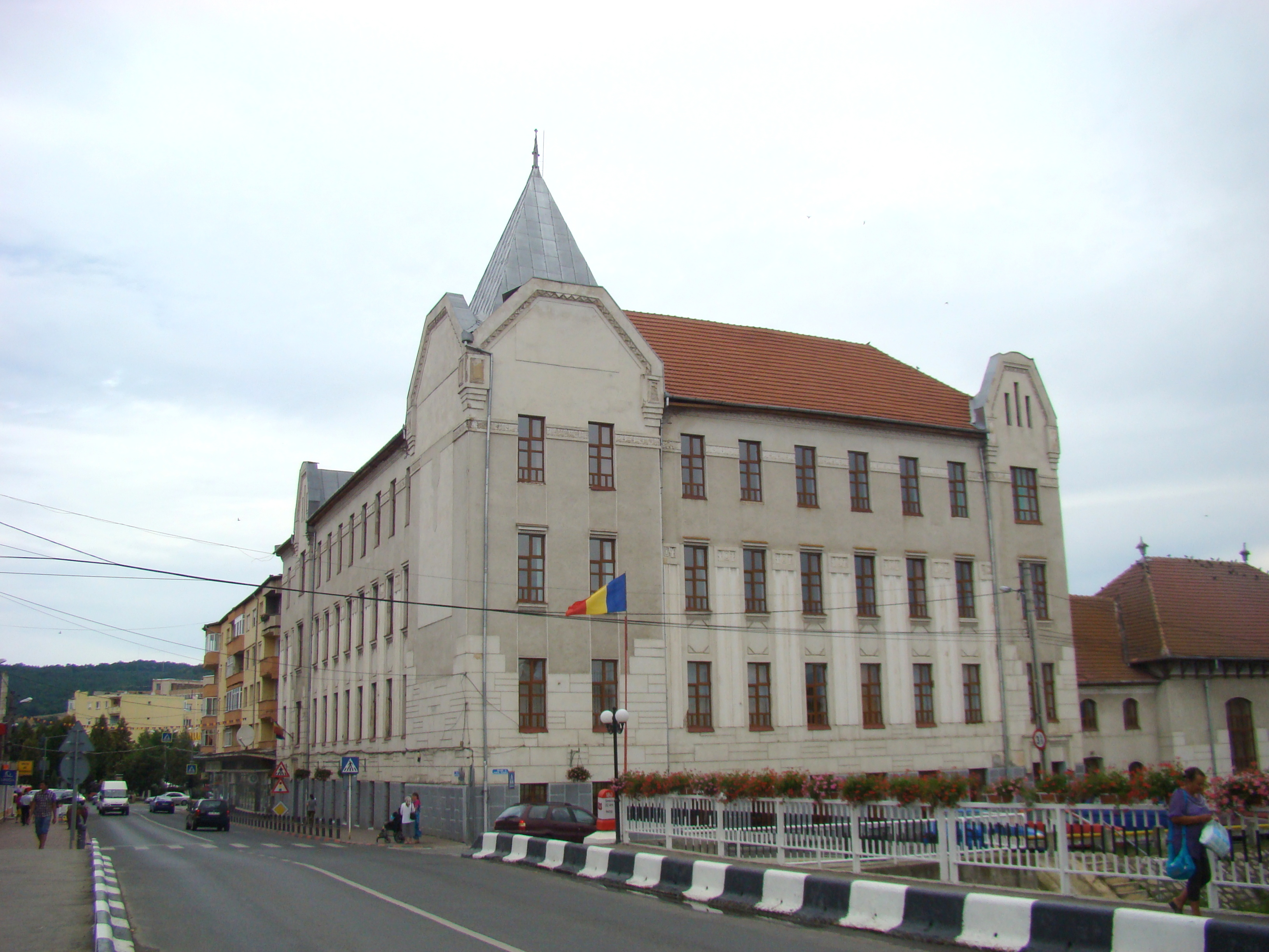 Colegiul Național „I.C. Brătianu”, oraș Hațeg, str. Munții Retezat 3